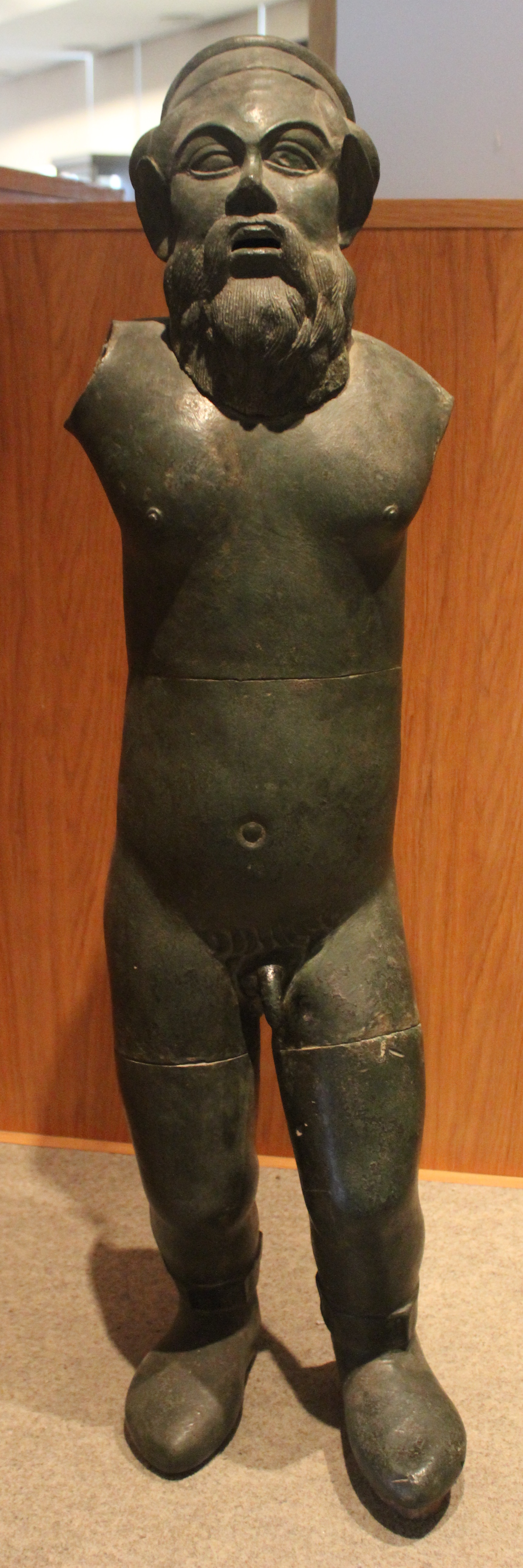 Paestum, Museo, estatua de Marsias.